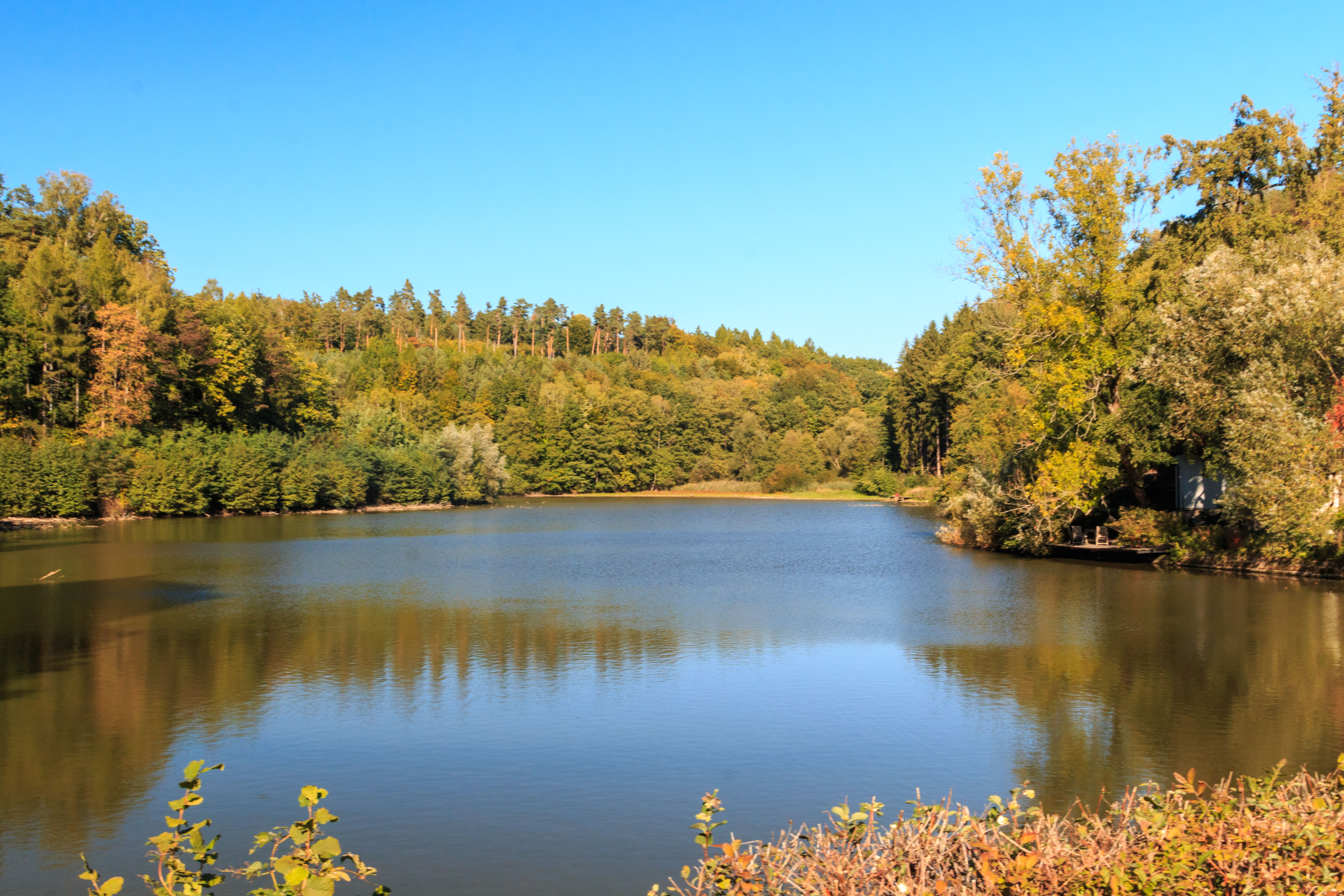 Bílý rybník v údolí Plakánek Project: Vodstvo